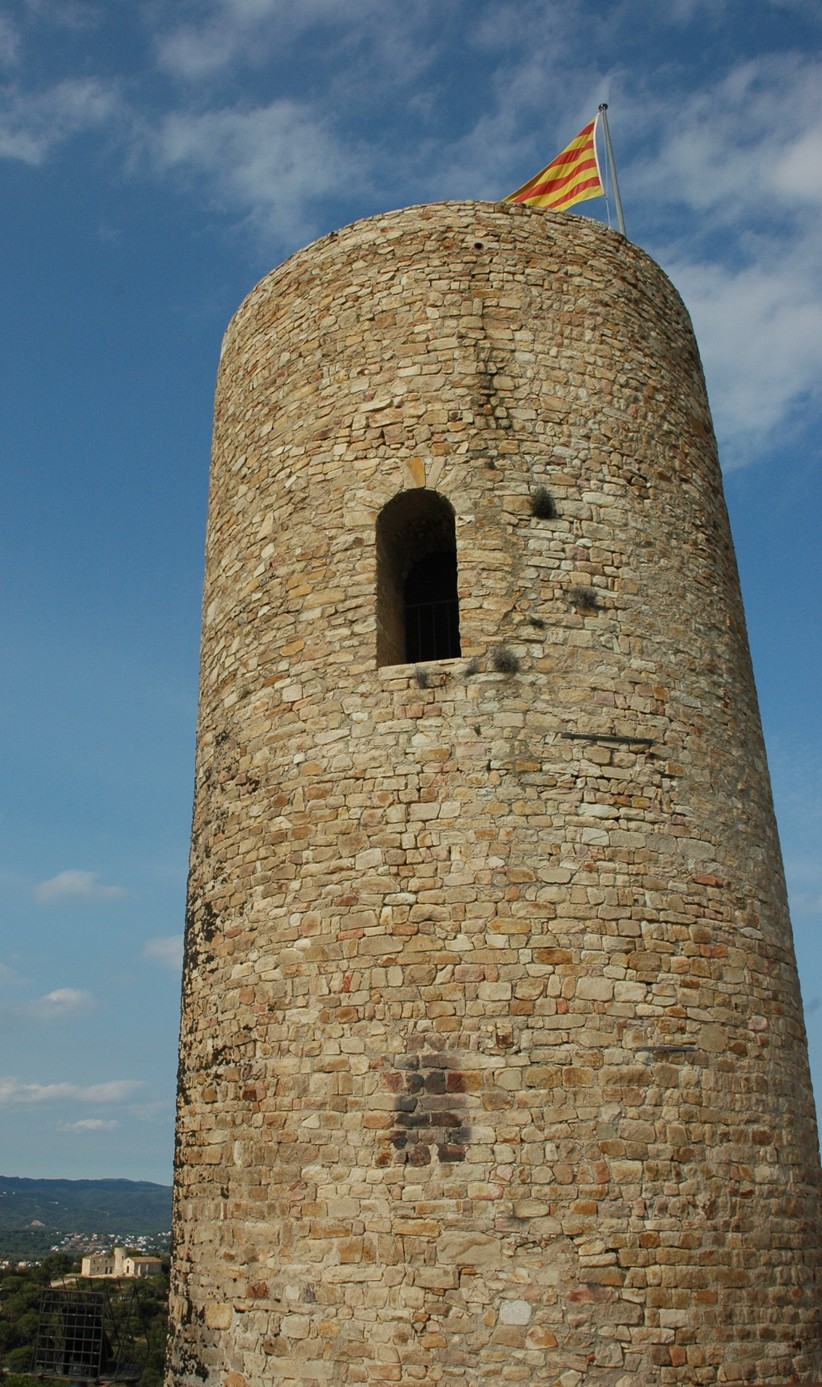 Torre Mestra del castell de Sant Joan de Blanes